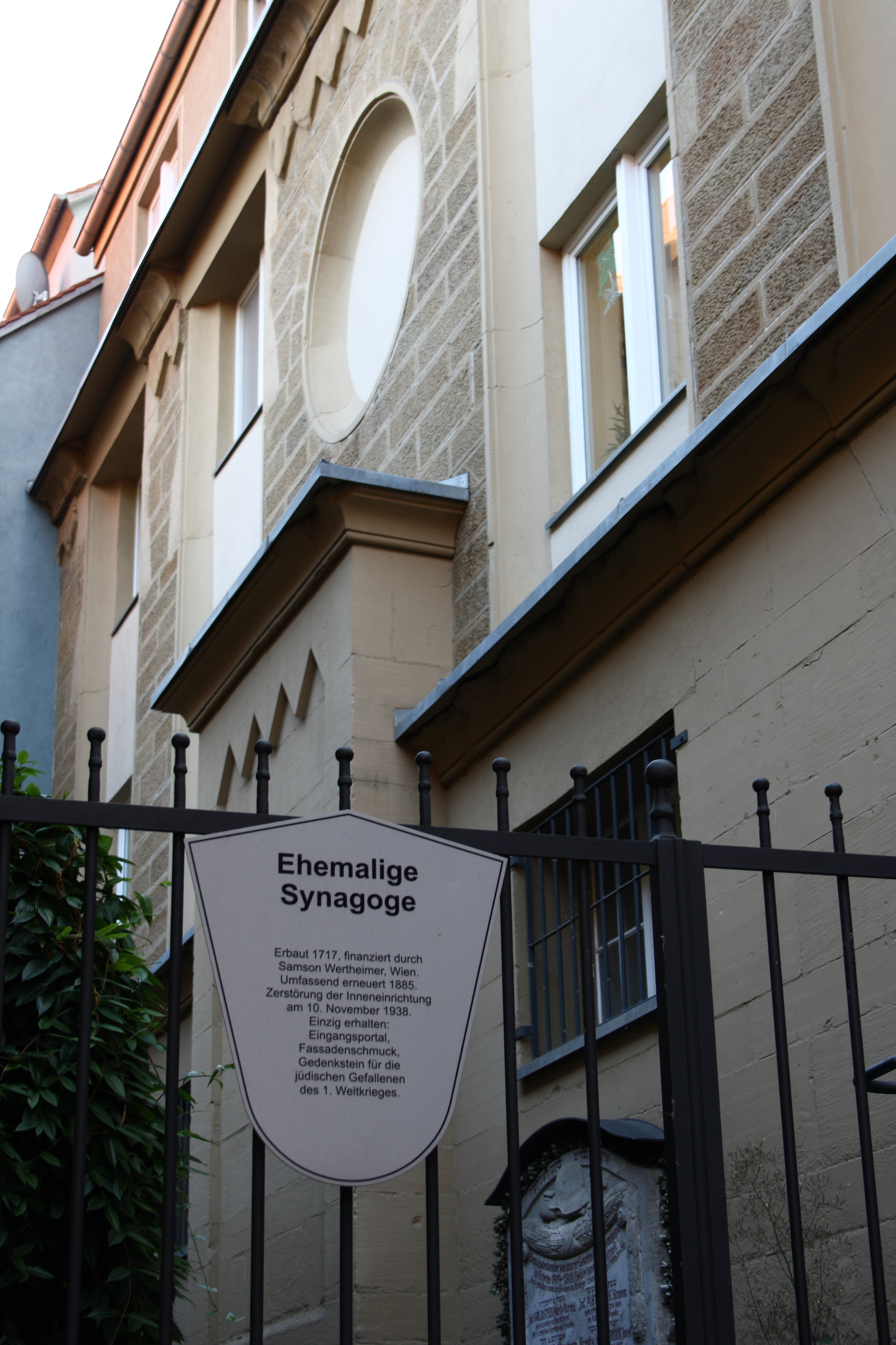 Haus Pförtleinsgasse 10 in Marktbreit Landkreis Kitzingen (Bayern), ehemalige Synagoge und jüdische Schule